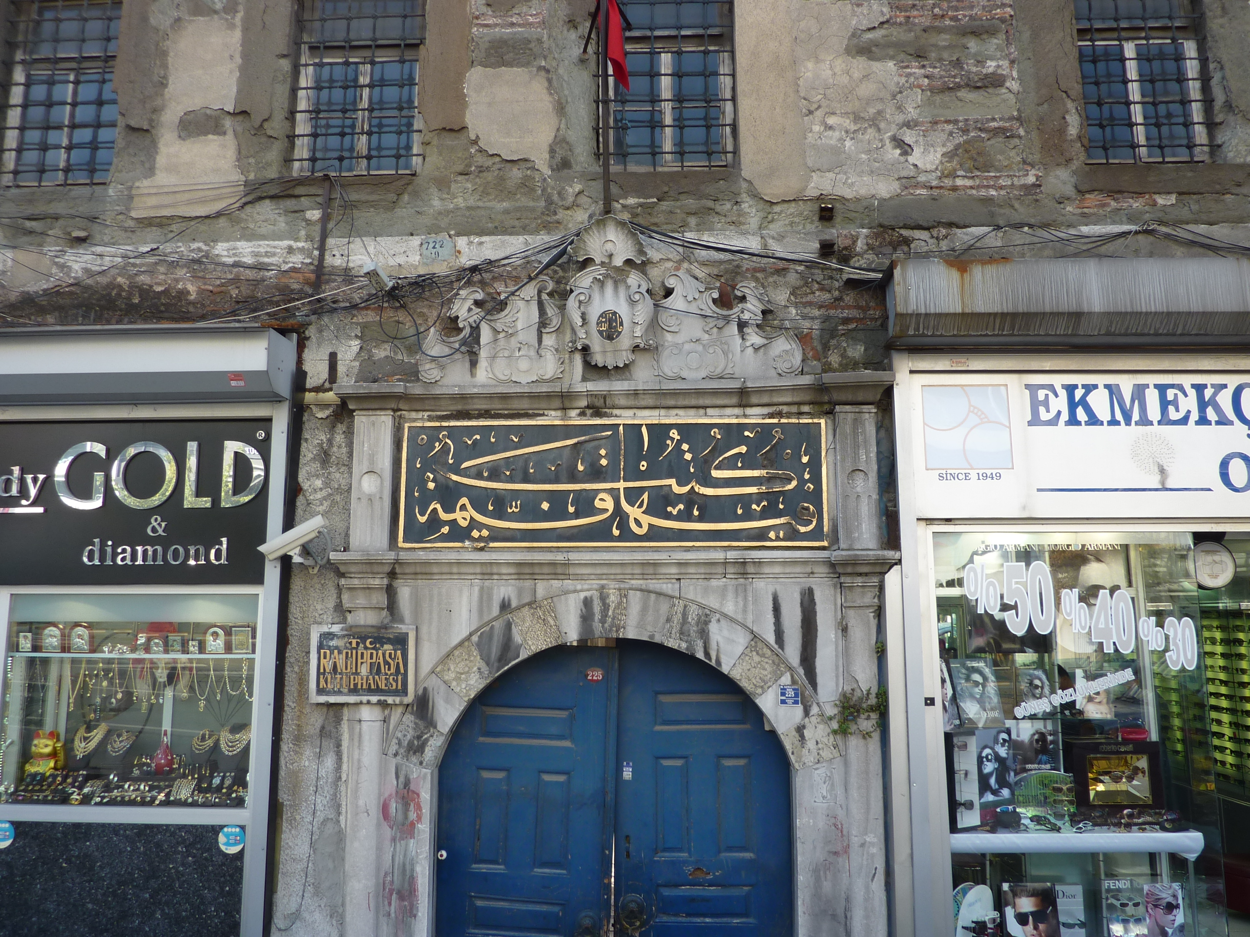 Ragıp Paşa Library (Ordu Cd., Istanbul), named after Koca Ragıp Pasha